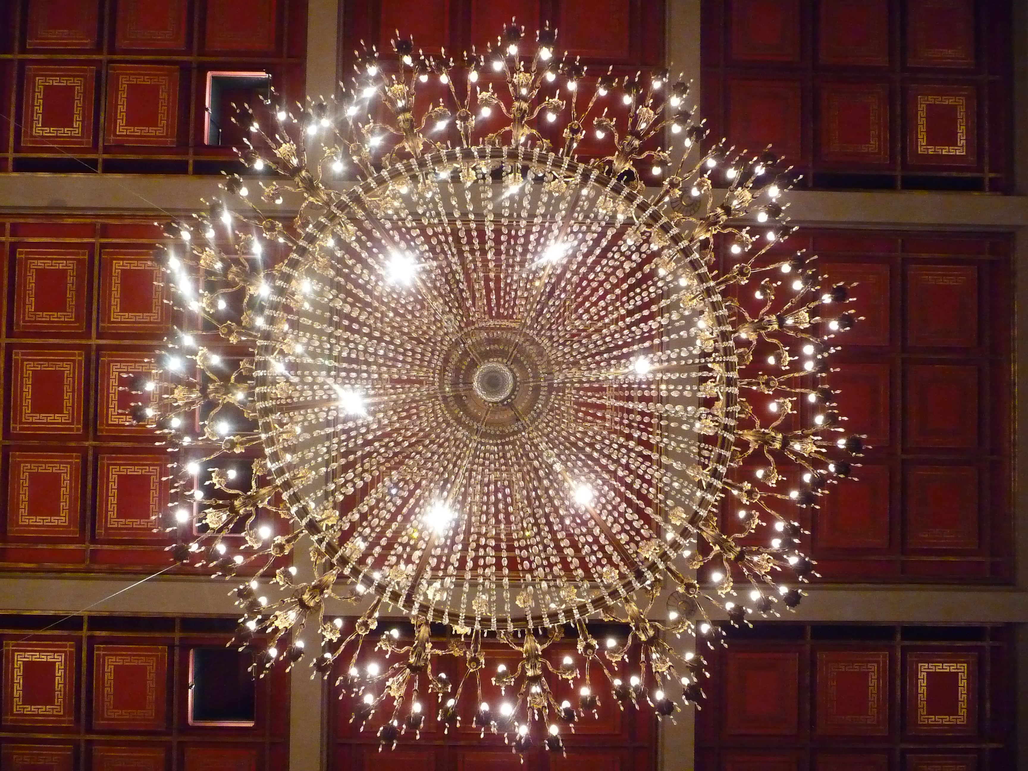 Kronleuchter im Weinbrenner Saal des Kurhauses in Baden-Baden (Baden-Württemberg, Deutschland)